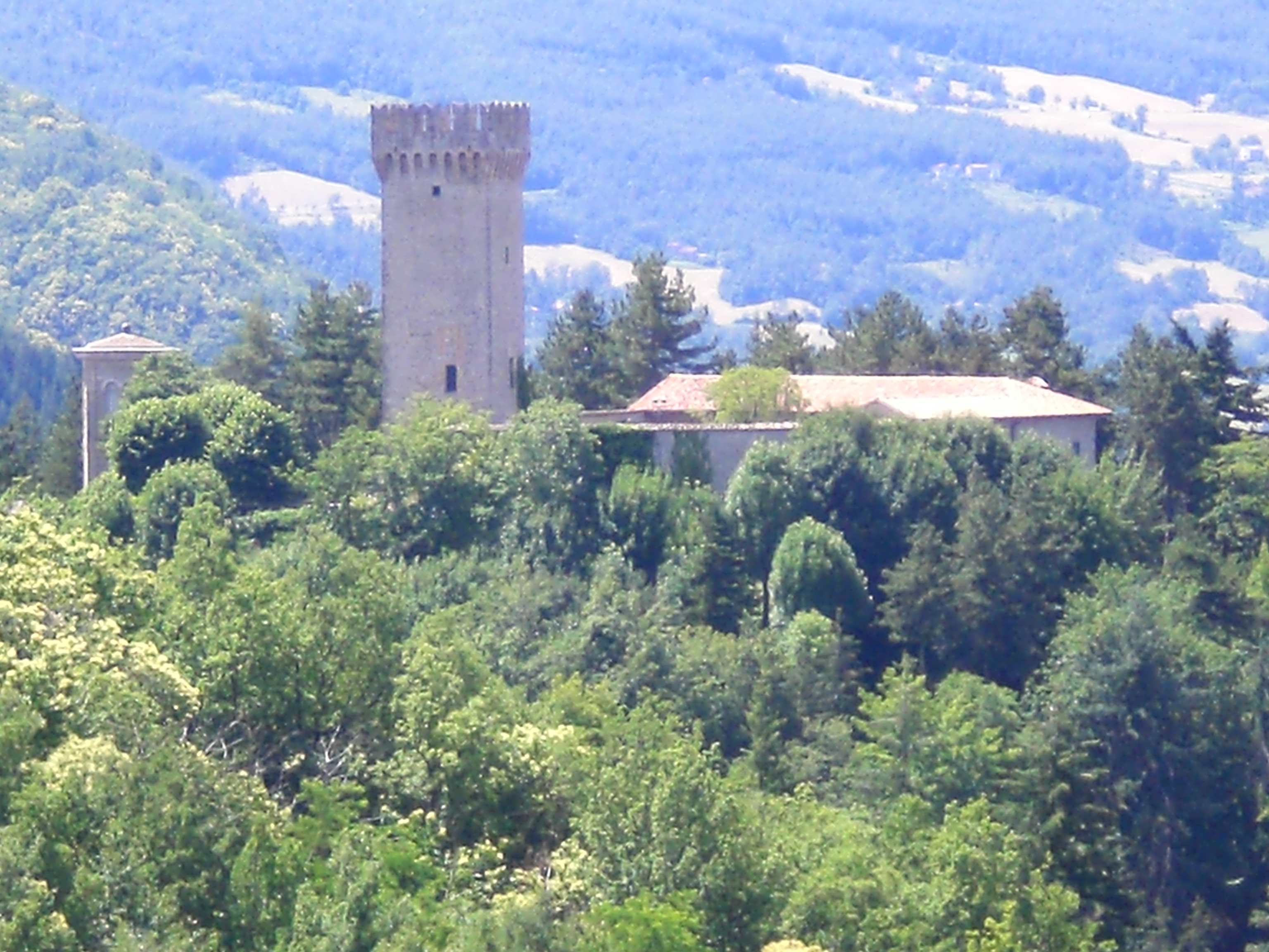 Rocca dal Montello